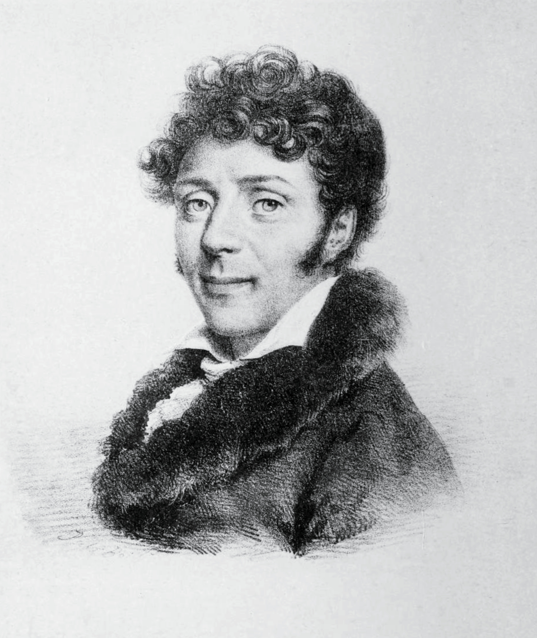 Alexandre_Soumet_d'après une lithographie de l'époque